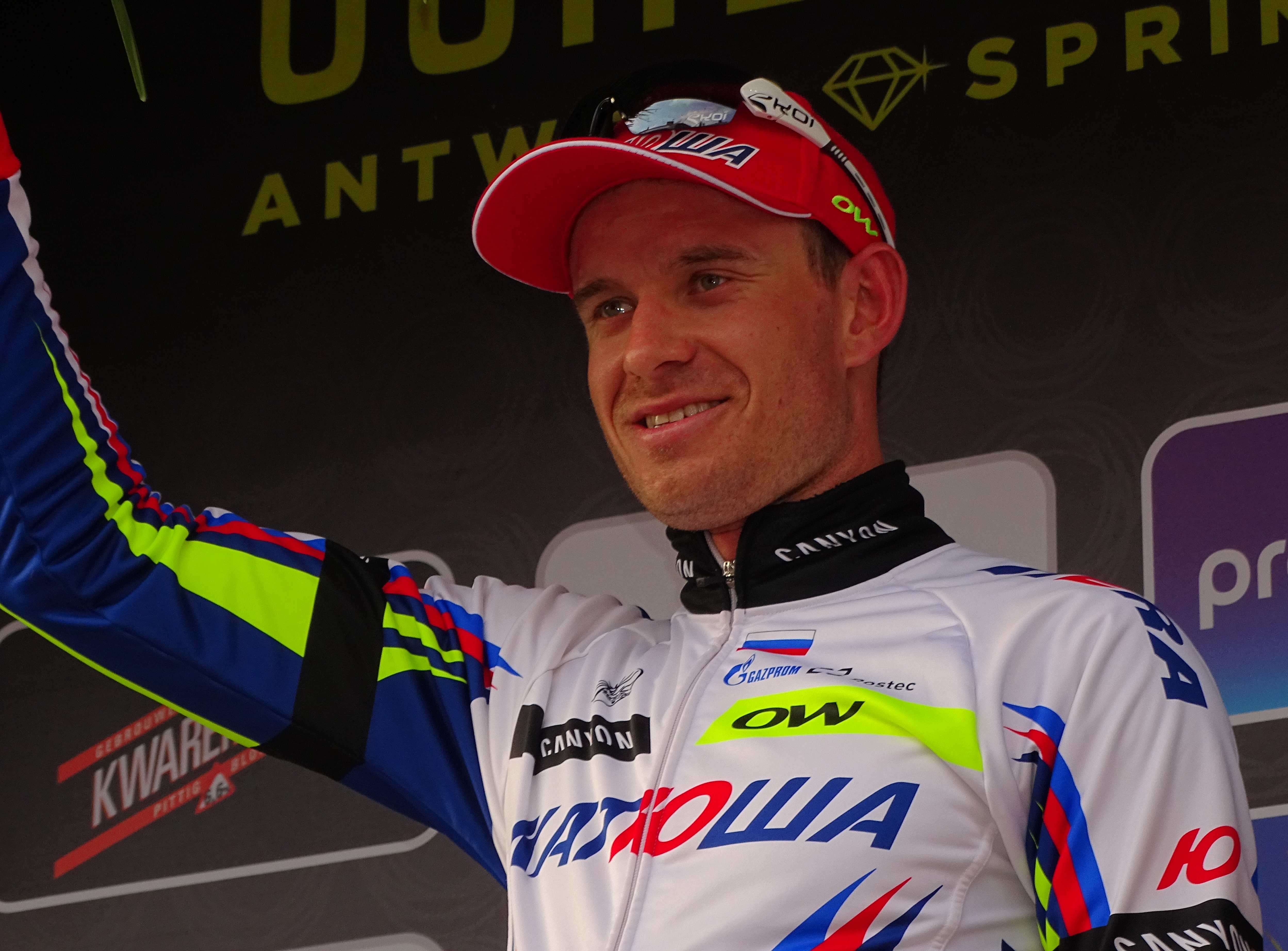 Reportage réalisé le mercredi 8 avril à l'occasion de l'arrivée du Grand Prix de l'Escaut 2015 à Schoten, Belgique.